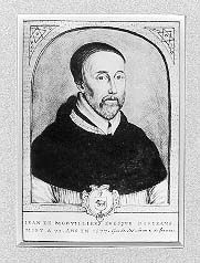 Jean de Morvilliers, ancien garde des Sceaux (1568-1571) et évêque d'Orléans.